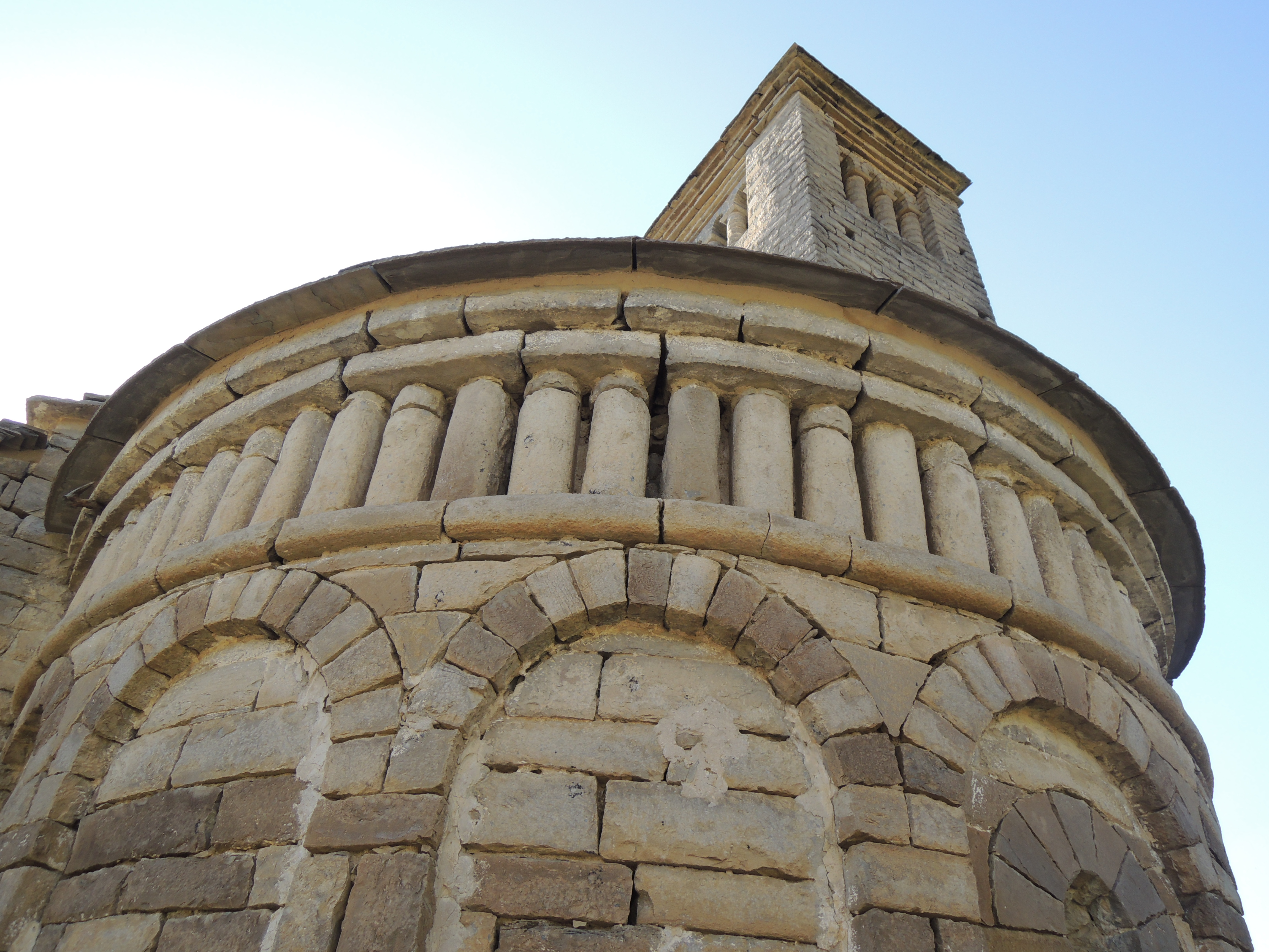 Cabecera y torre.